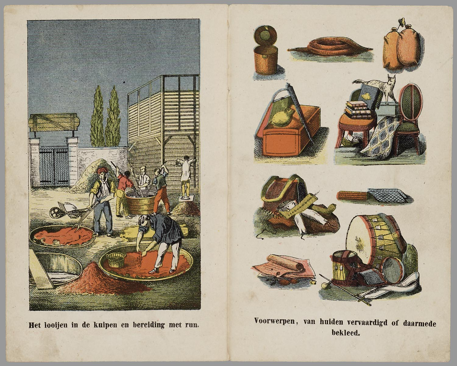 Boekje met in kleur gedrukte litho's, soms meerdere op een blad. Bevat 8 bladen met plaatjes met daaronder korte onderschriften over het verkrijgen van huiden door de jacht en het houden van vee, bontwerksters, het looien en bewerken van huiden, voorwerpen die van huiden zijn gemaakt en afbeeldingen van een handschoenmaker, een schoenmaker en een zadelmaker. 8 bl. pl : gekl. lith // Op de voorkant in sierletters: Nieuwe Nederlandsche kinderboeken // Datering: niet in Brinkman; uitgever werkzaam van 1863 tot 1881; schatting // De keerzijde der bladen is onbedrukt // Ingekleurd Leerbewerking // Prentenboeken // Informatieve boeken